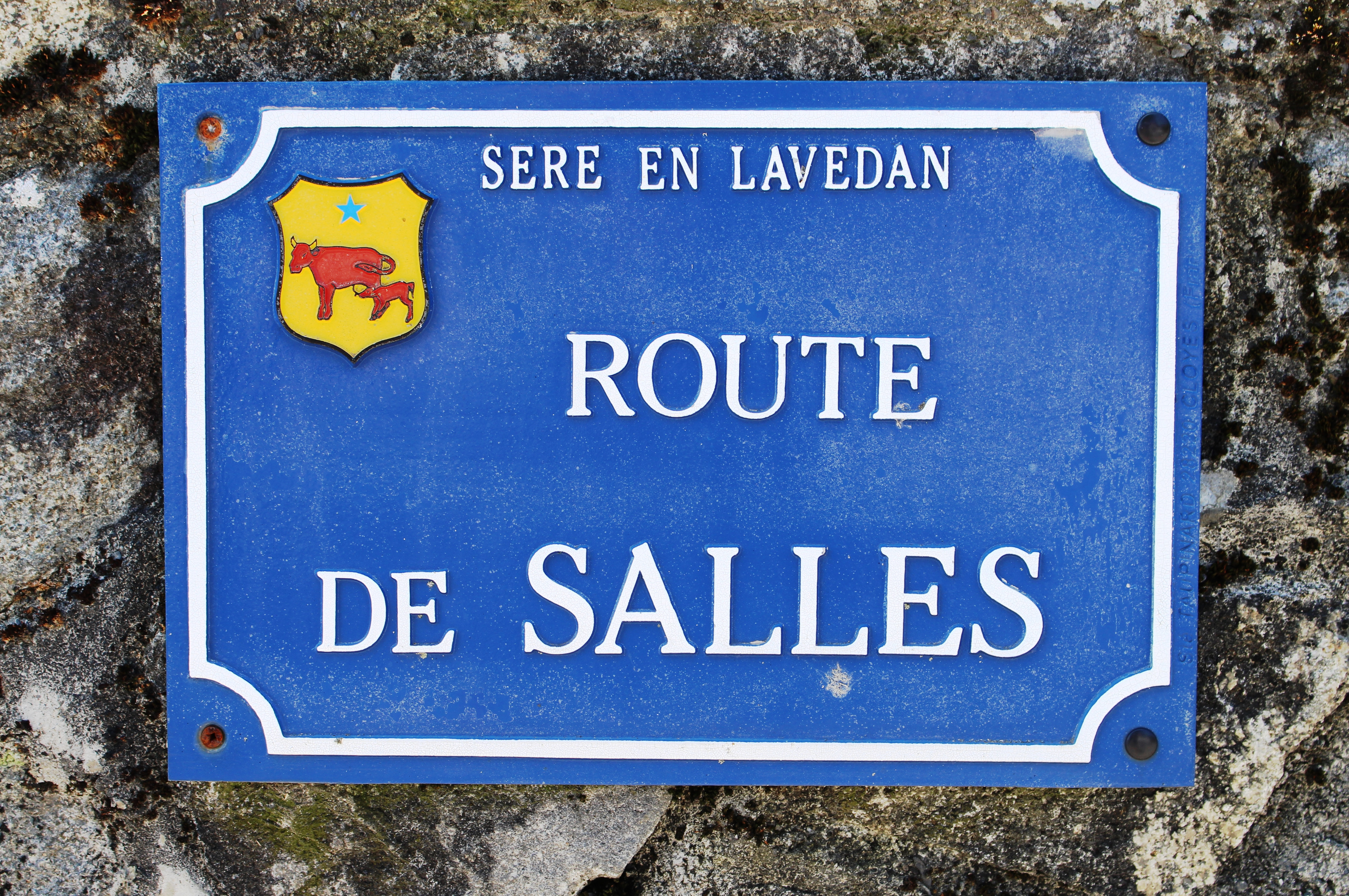 Rue du village de Sère-en-Lavedan (Hautes-Pyrénées)